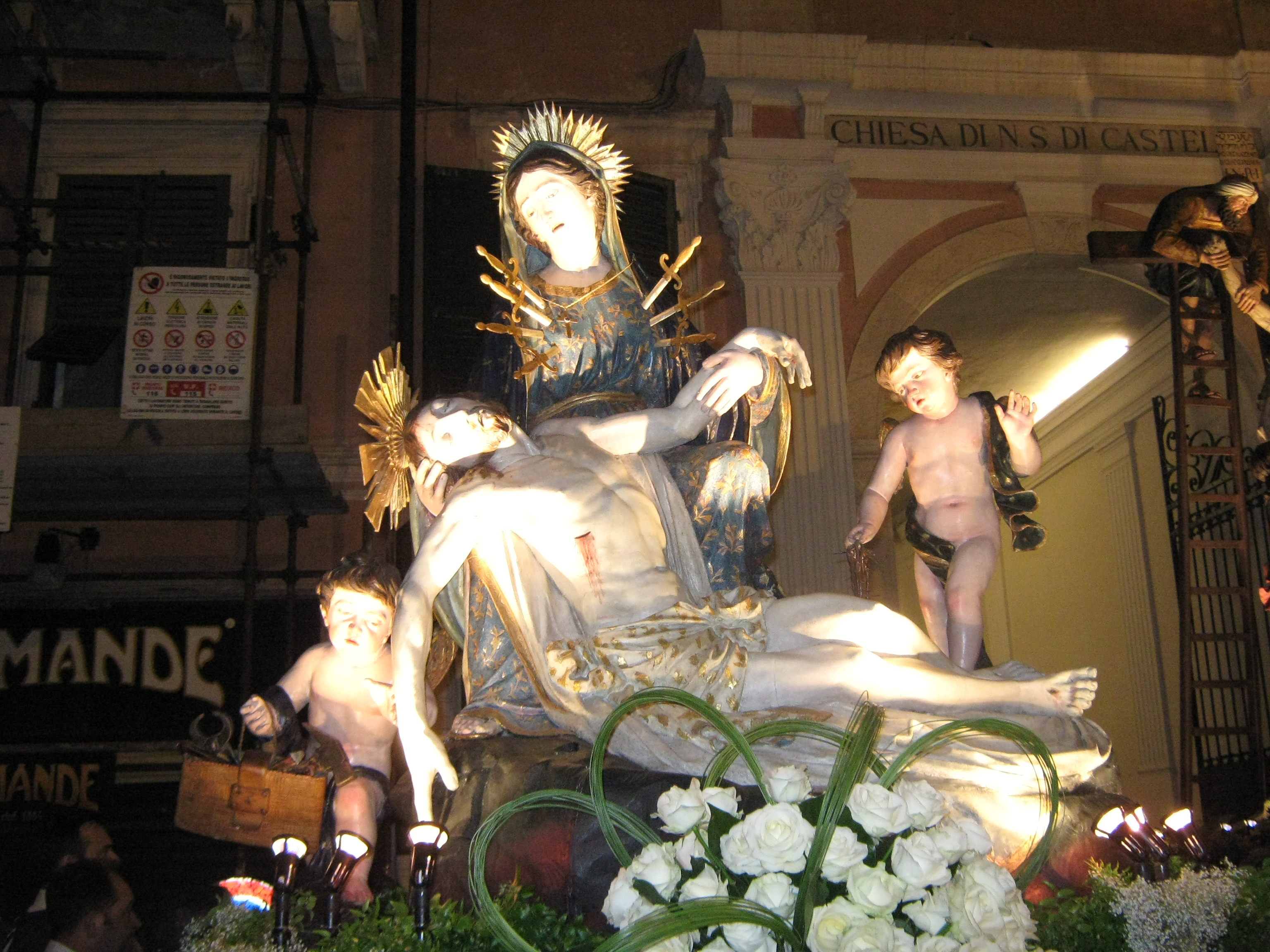 Cassa processionale in legno policromo La Pietà, Stefano Murialdo 1833.Misure: 195x155x125cm. Confraternita di N.S. di Castello. Processione del Venerdì Santo di Savona 2010.